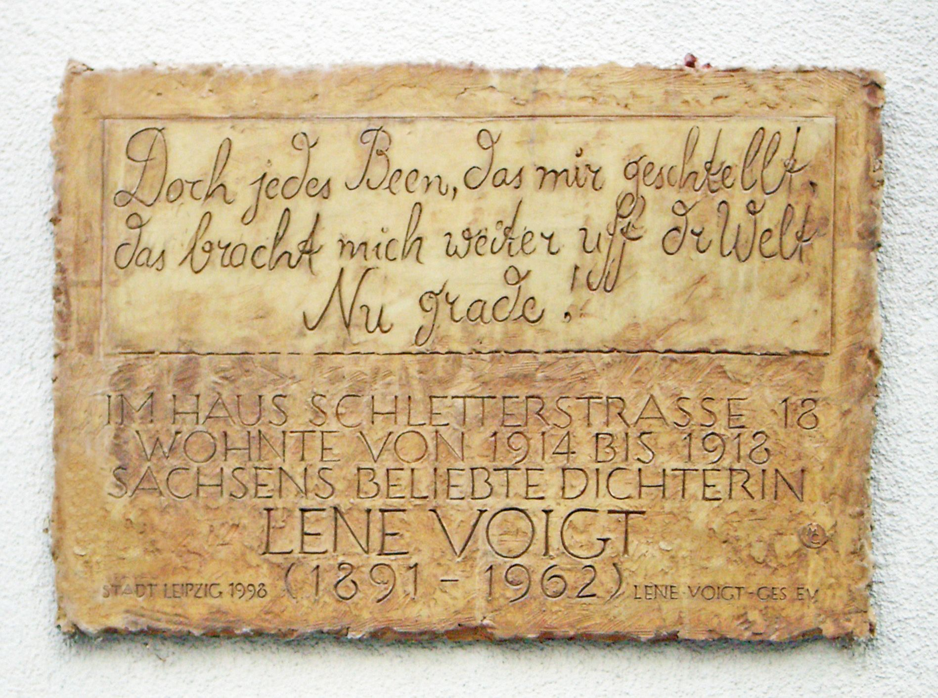 Erinnerungstafel an Lene Voigt in der Leipziger Schletterstraße. Herstellung: Markus Gläser